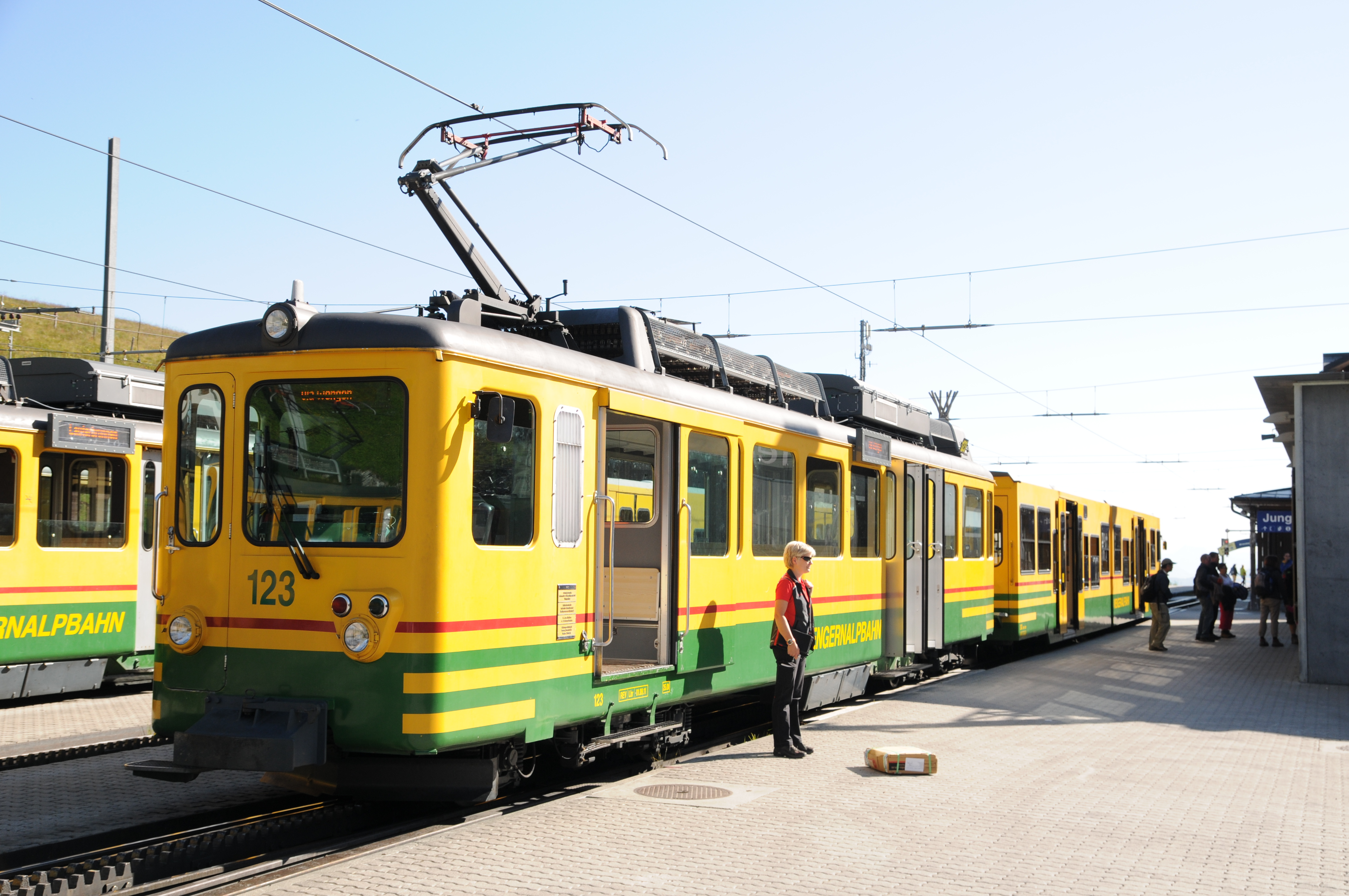 Berner Oberland.